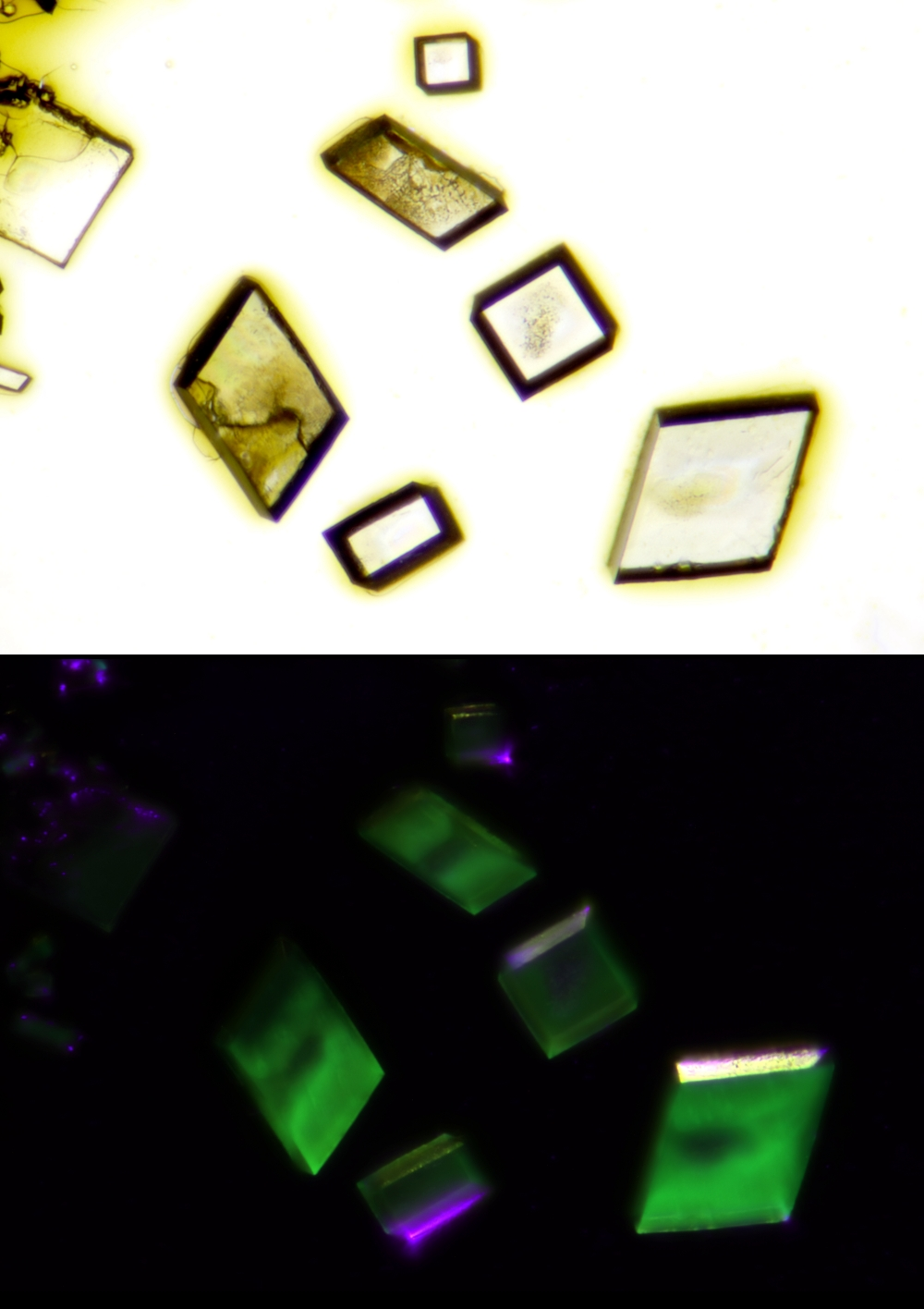 8-Anilinonaphthalin-1-sulfonsäure, Kristalle mikroskopisch im Durchlicht (oben) und Fluoreszenz im Schwarzlicht (unten)